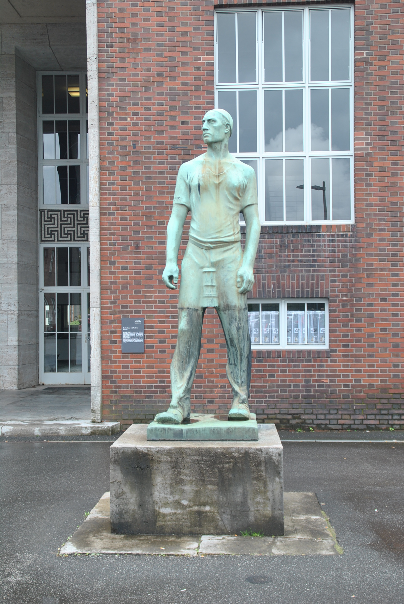 Statue "Der Saarbergmann", im Volksmund "Redener Hannes" genannt - Statue von Fritz Koelle, 1937